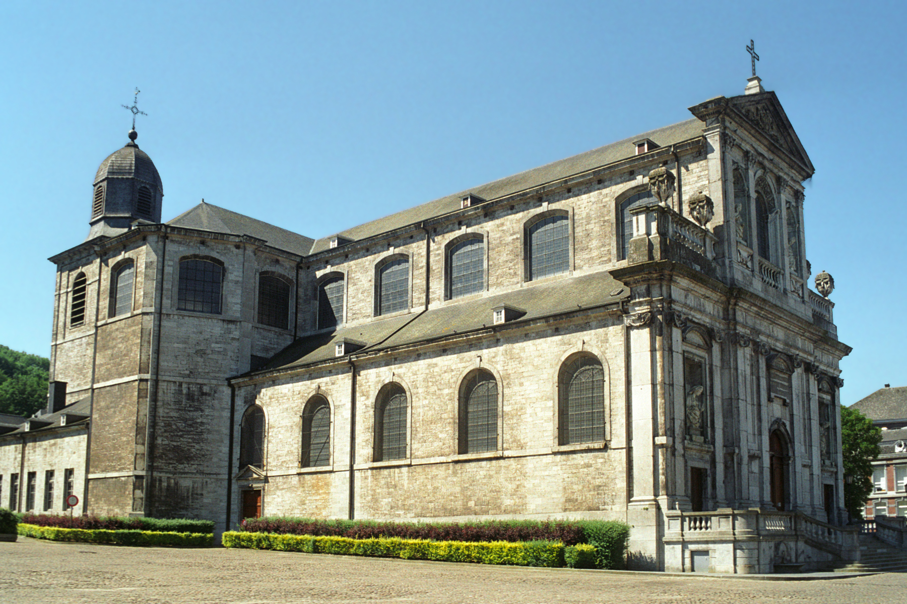 Belgique - Wallonie - Collégiale Sainte-Begge d'Andenne